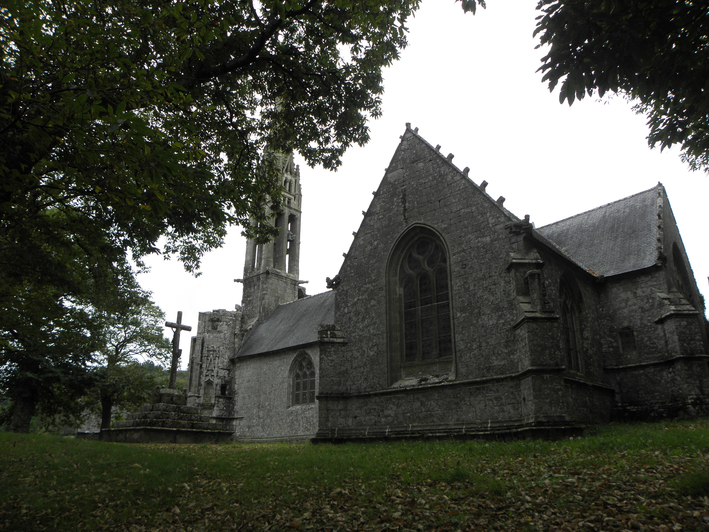 Vue méridionale de la chapelle Saint-Théleau en Plogonnec (29). .